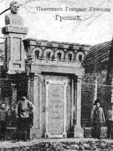 Памятный бюст генералу А. П. Ермолову в Грозном. Установлен в 1888 году. Скульптор А. Л. Обер.